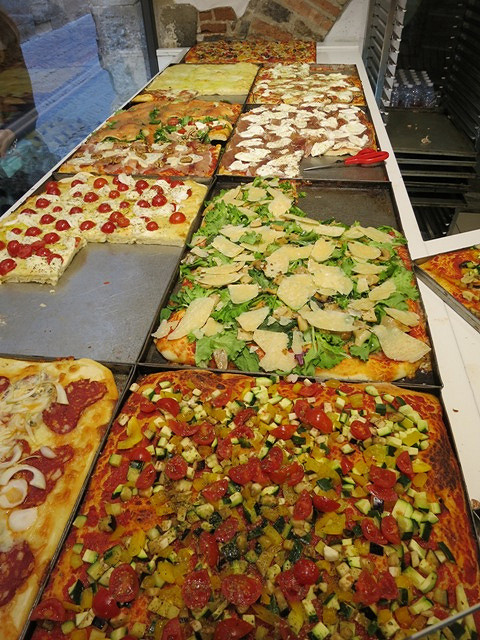 Pizza al taglio sold by the slice